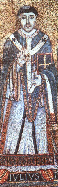 Pope Julius I (337 - 352)